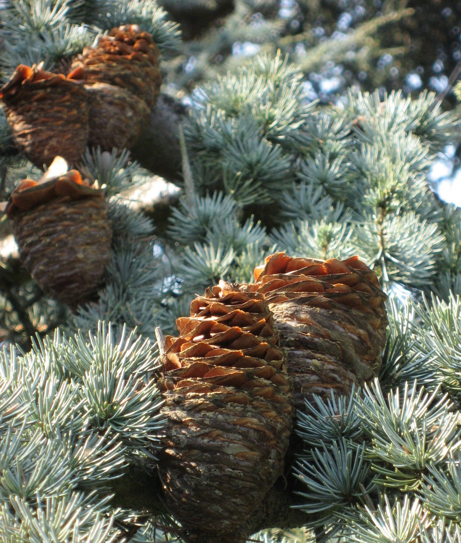 Cedrus libani ssp. atlantica 'Glauca' — in Arboretum de la Vallée-aux-Loups Map: 48° 46' 22" N 2° 16' 5" E